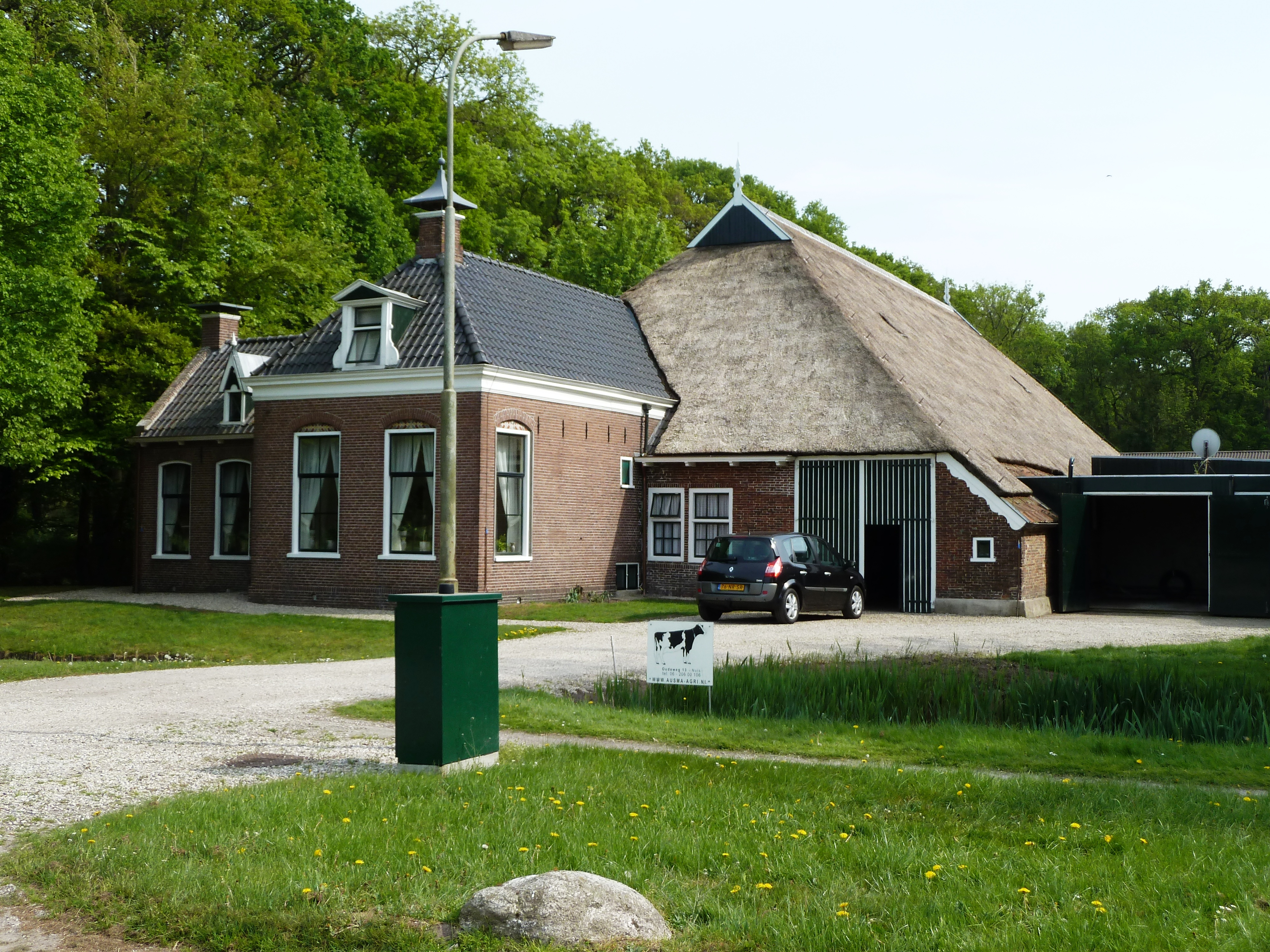 Kop-rompboerderij met aangebouwde stookhut uit omstreeks 1880 aan de Oudeweg 13 in Nuis (Marum, Groningen, Nederland). Gebouwd in een Ambachtelijk-traditionele stijl en waarschijnlijk van oudsher behorende bij de Coendersborg.